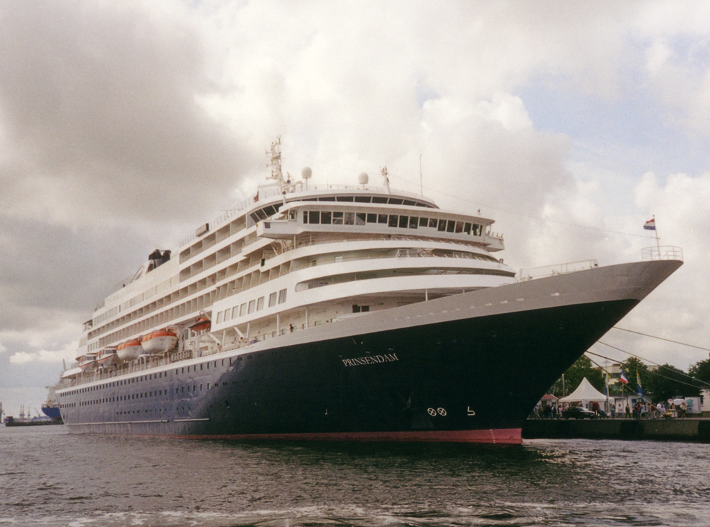 Beschreibung: Prinsendam in Warnemünde / 2002